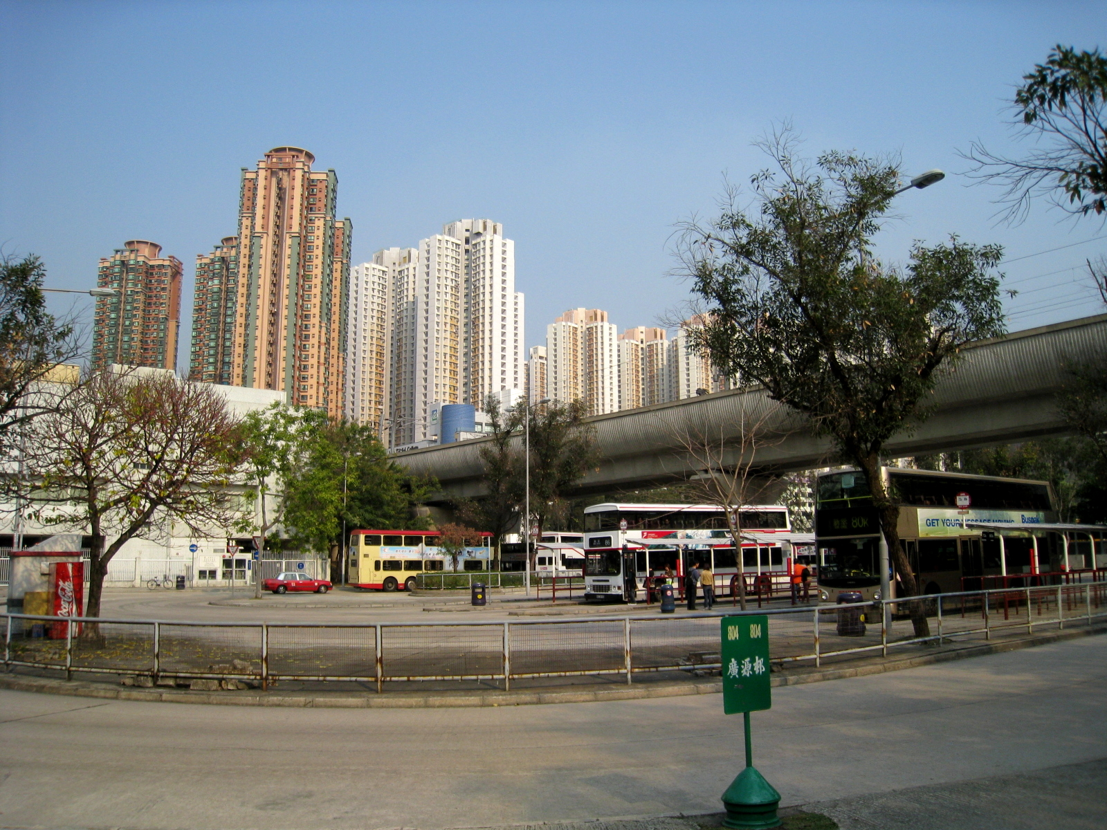 HK Shatin Yuen Chau Kok Bus Terminal